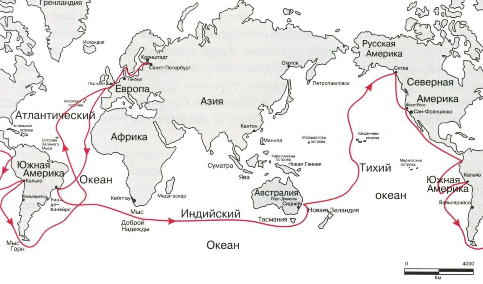 Карта плавания М.П.Лазарева на шлюпе "Суворов" (1813-1815)